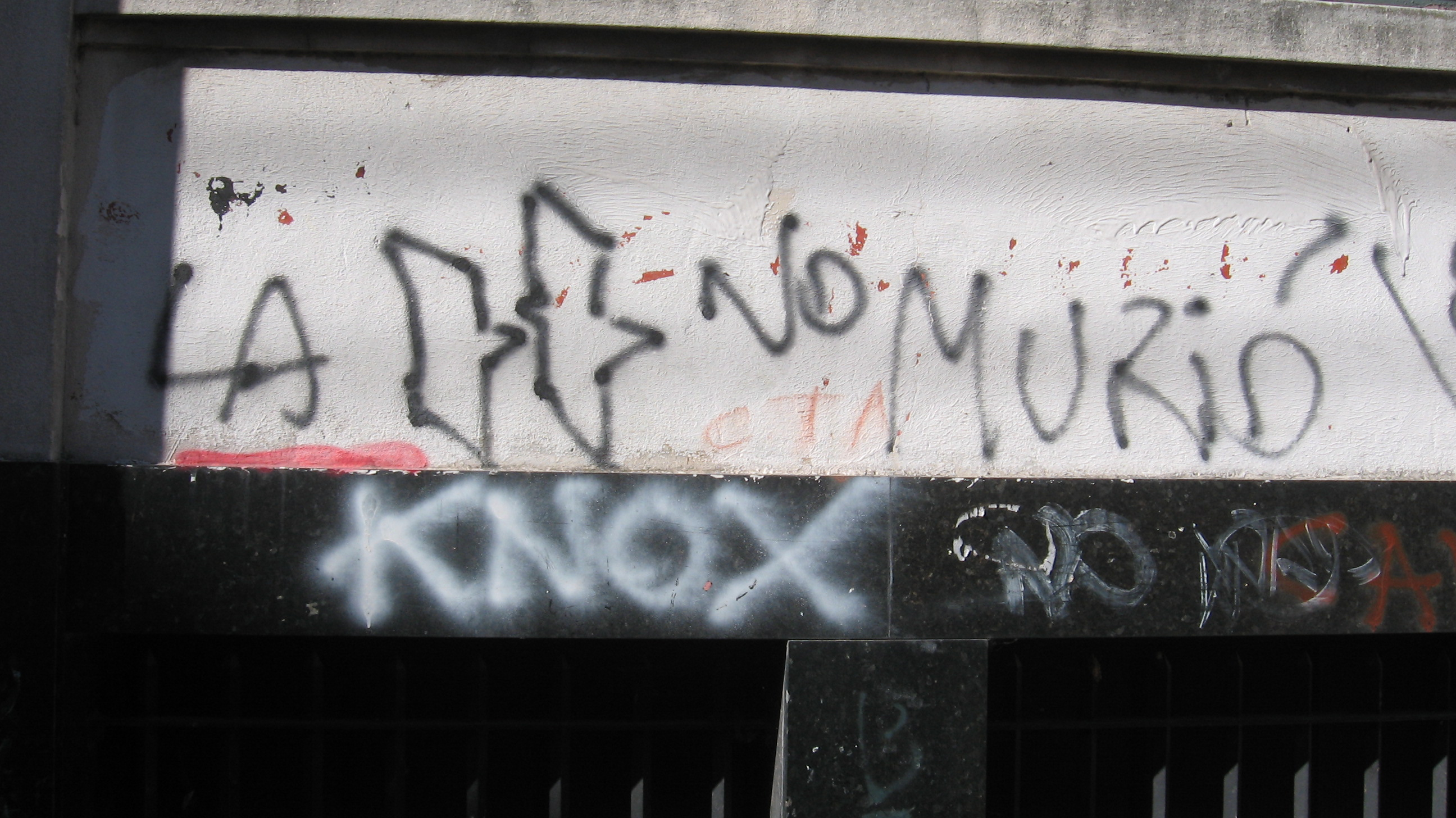 Grafiti que, bajo el apelativo de "La H", hace refencia a la banda separada Hermética. Situado en Dr. T. M. de Anchorena 200, ciudad de Buenos Aires